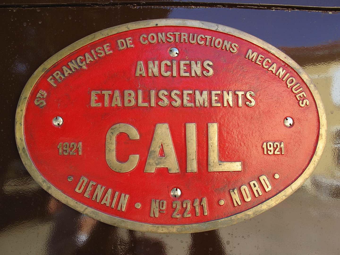 Plaque de constructeur CAIL du 23 A 168 attelé à la 230 D 116 de l'AJECTA.